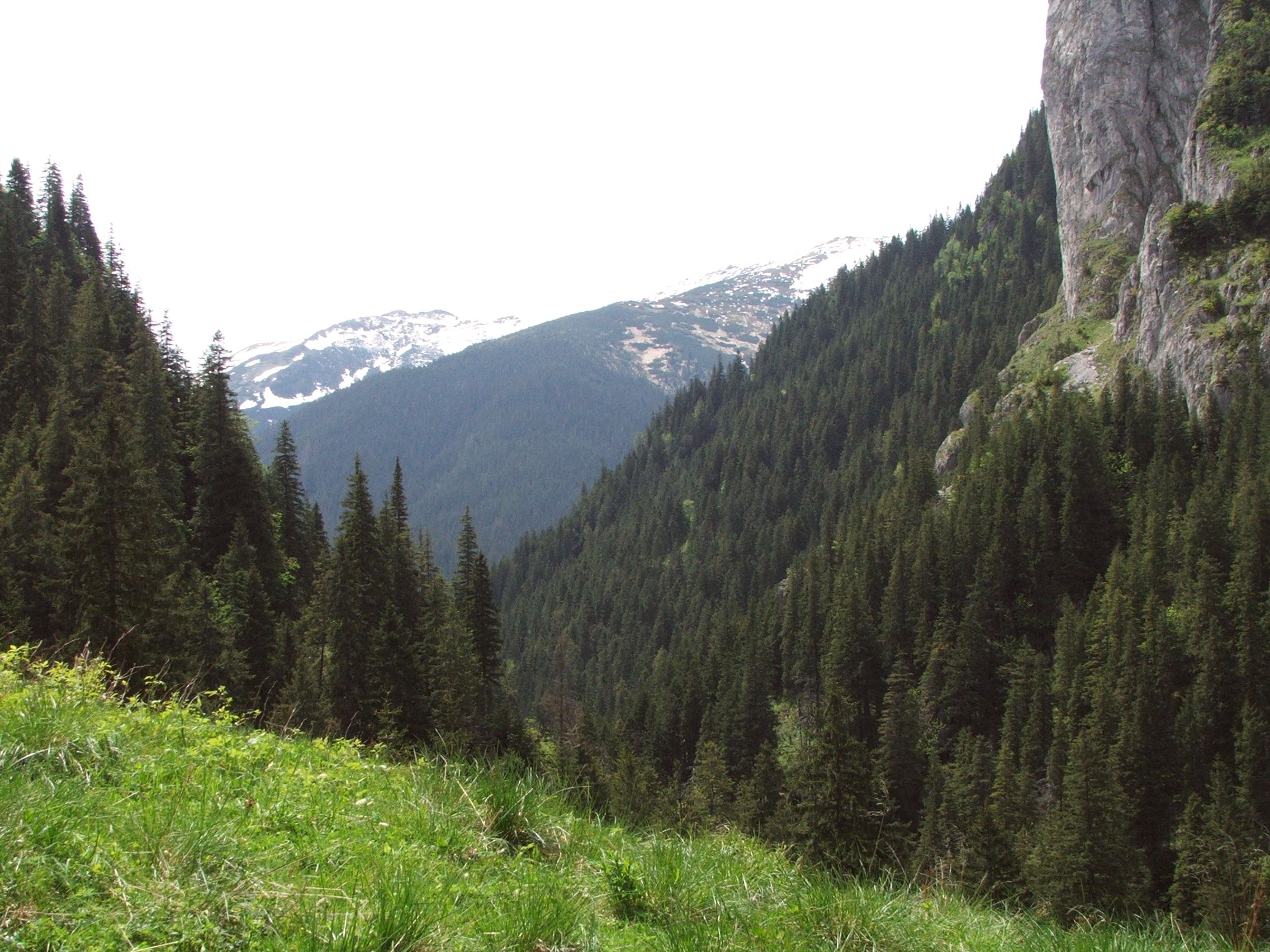 Widok na południe z Polany Pisana. Po prawej Raptawicka Turnia, w głębi Ornak